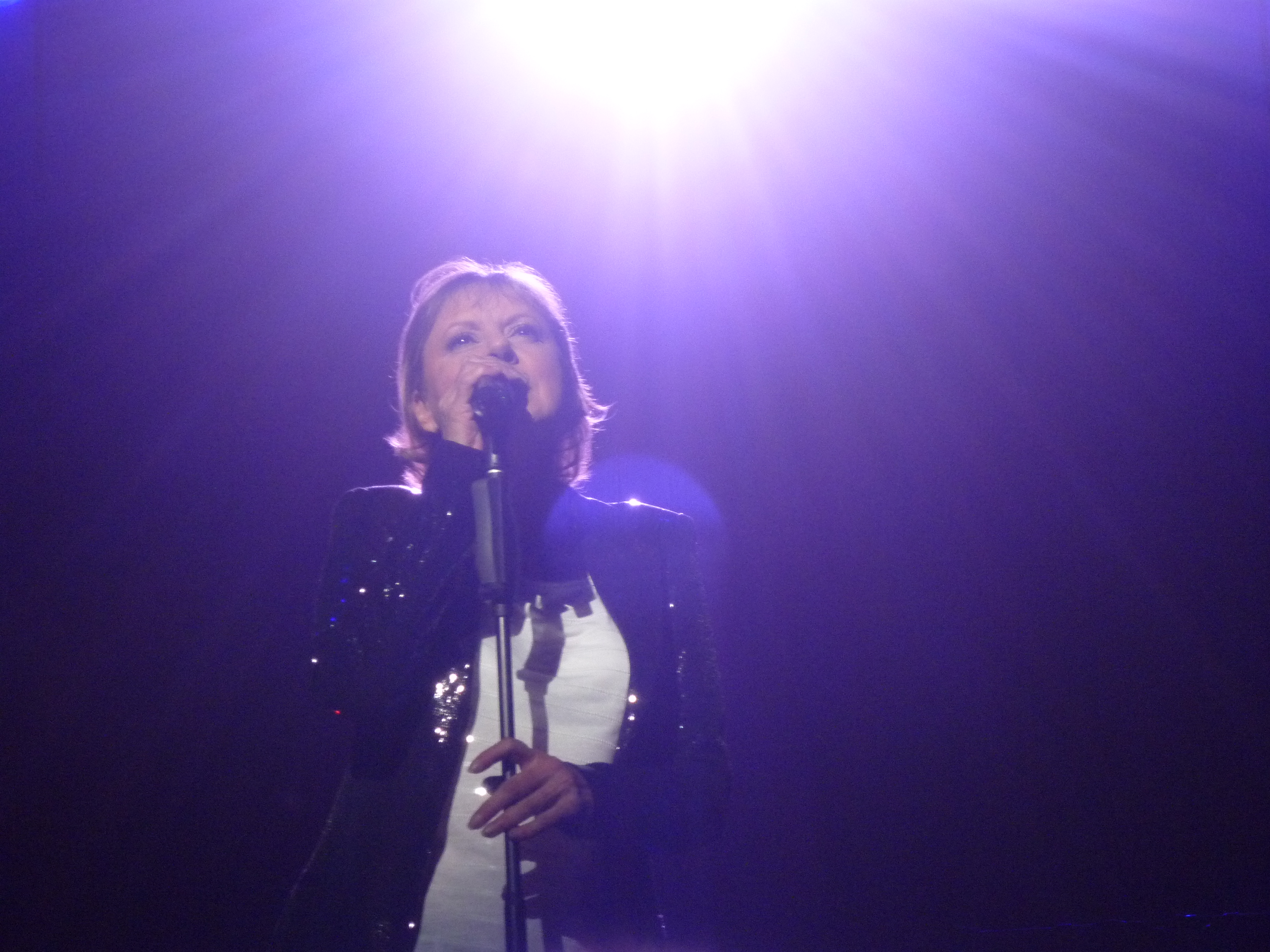 Dorothée interprète "Sept Ans Et Demi" lors de son concert à l'Olympia le 17 Avril 2010.